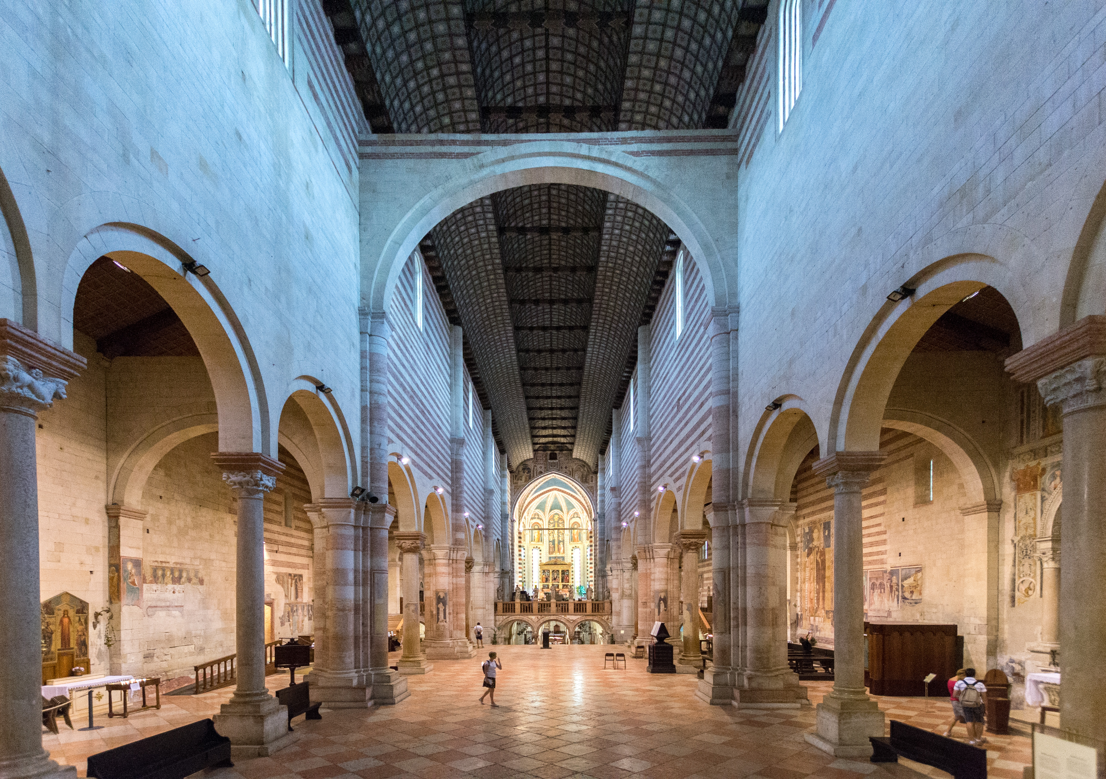 Vérone - Sans Zeno - Net